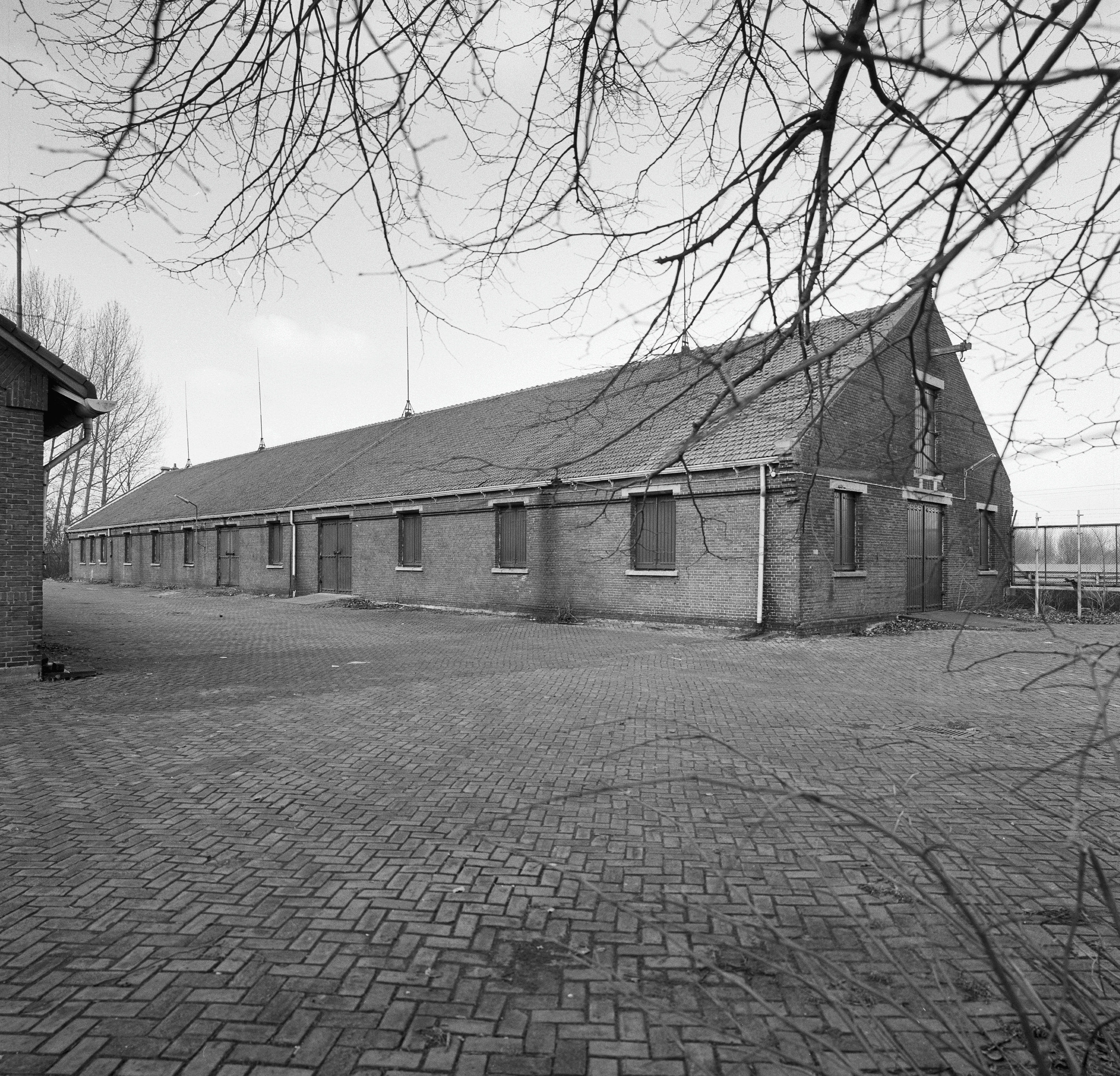 Munitiecomplex De 1800-Roeden: Exterieur OVERZICHT